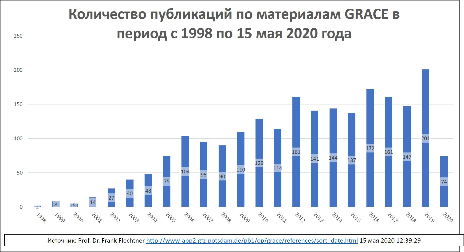 Публикации по материалам эксперимента GRACE